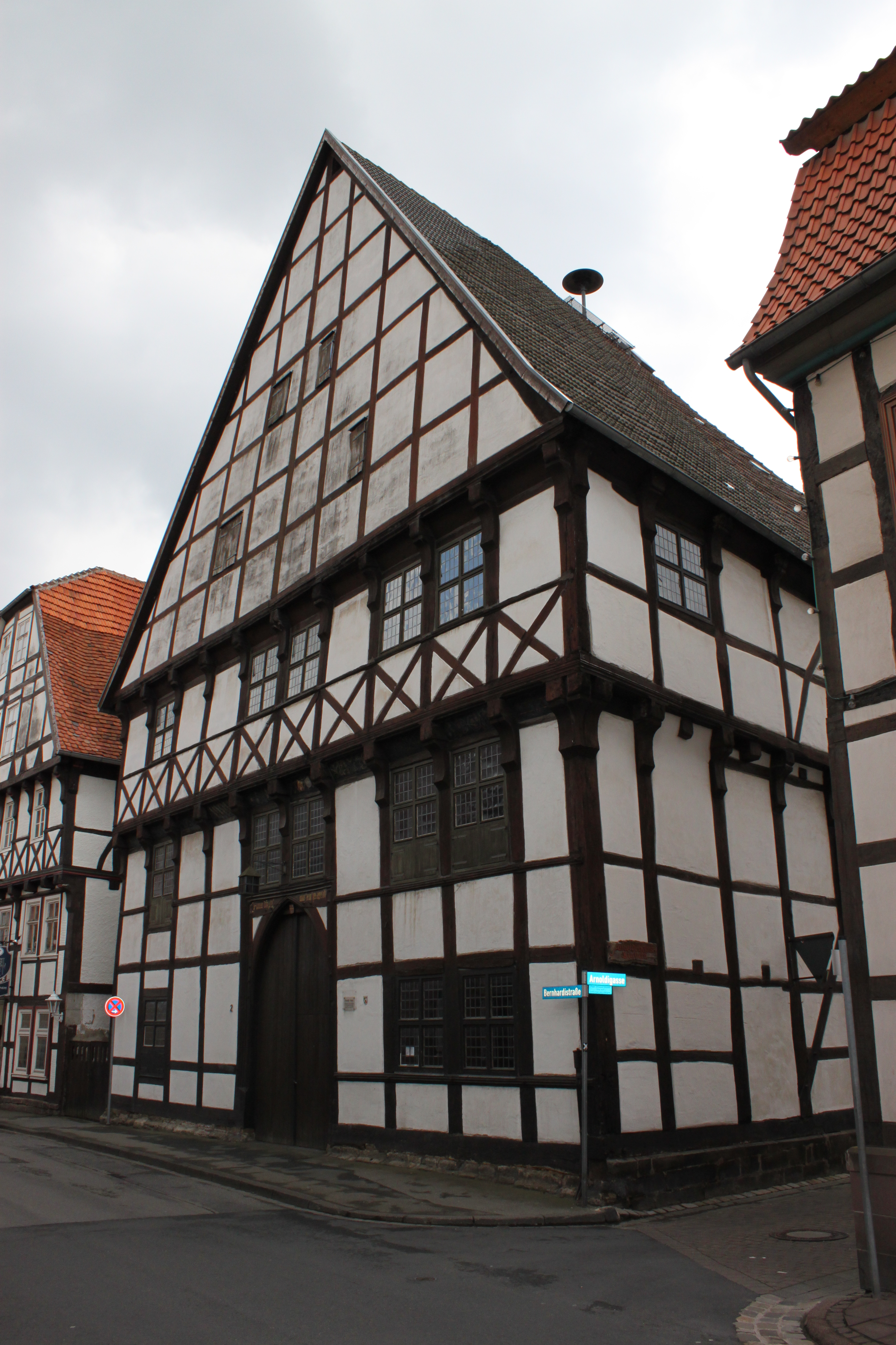 Arnoldihaus in Warburg, 1513 erbaut